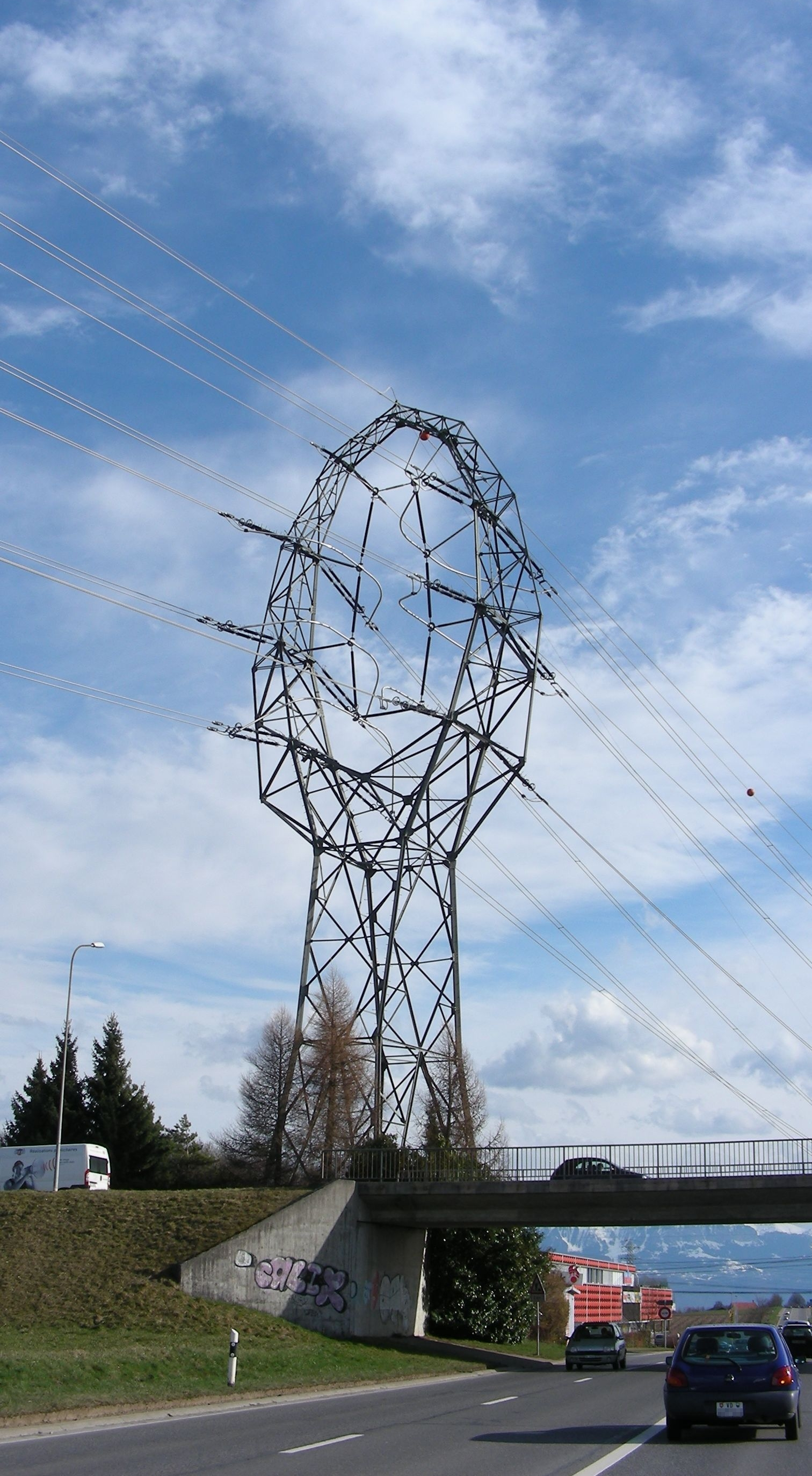 Freileitungsmast nördlich vom Umspannwerk Romanel in Romanel-sur-Lausanne, Kanton Waadt, Schweiz